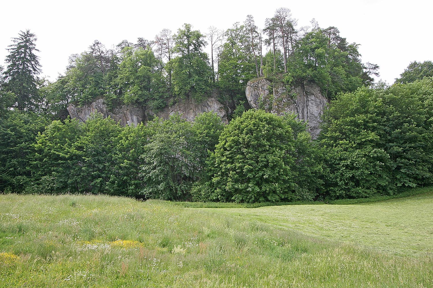 skála se zříceninou hradu Holštejn v Moravském krasu